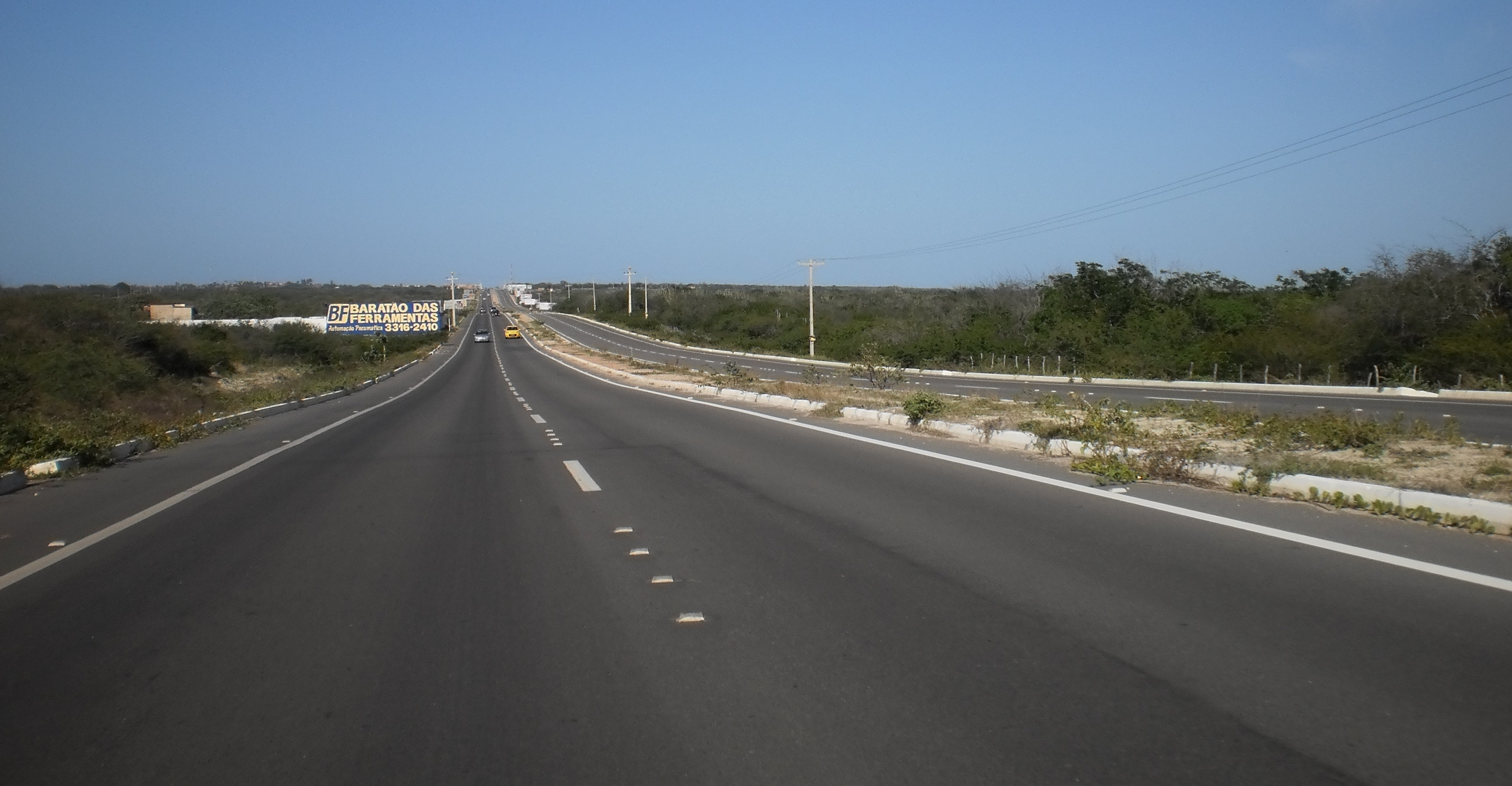 Rodovia estadual RN-013, na entrada de Tibau (liga este município a Mossoró), Rio Grande do Norte (Brasil).